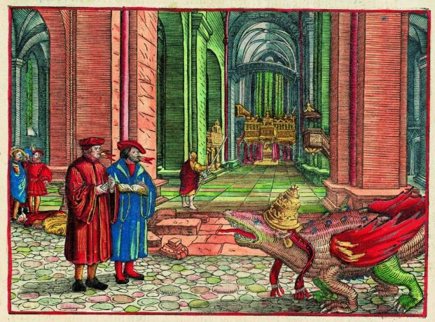 Le incendiarie illustrazioni di Lucas Cranach per la Bibbia di Martin Lutero: il libro che ha cambiato per sempre il cristianesimo.